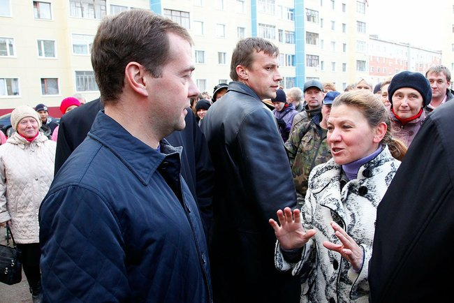 С жителями города.